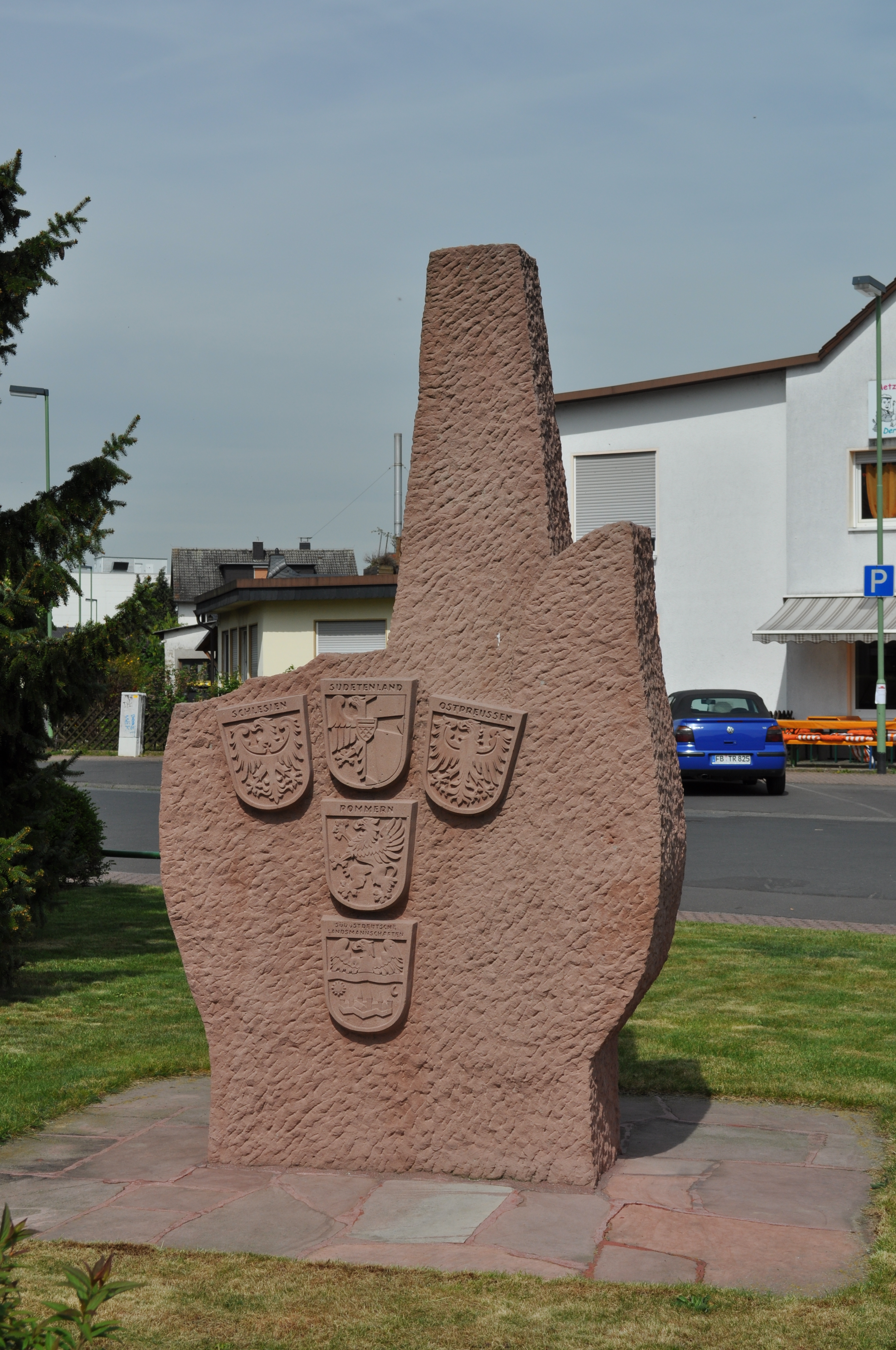 Rückseite des Vertiebenendenkmals in Dortelweil